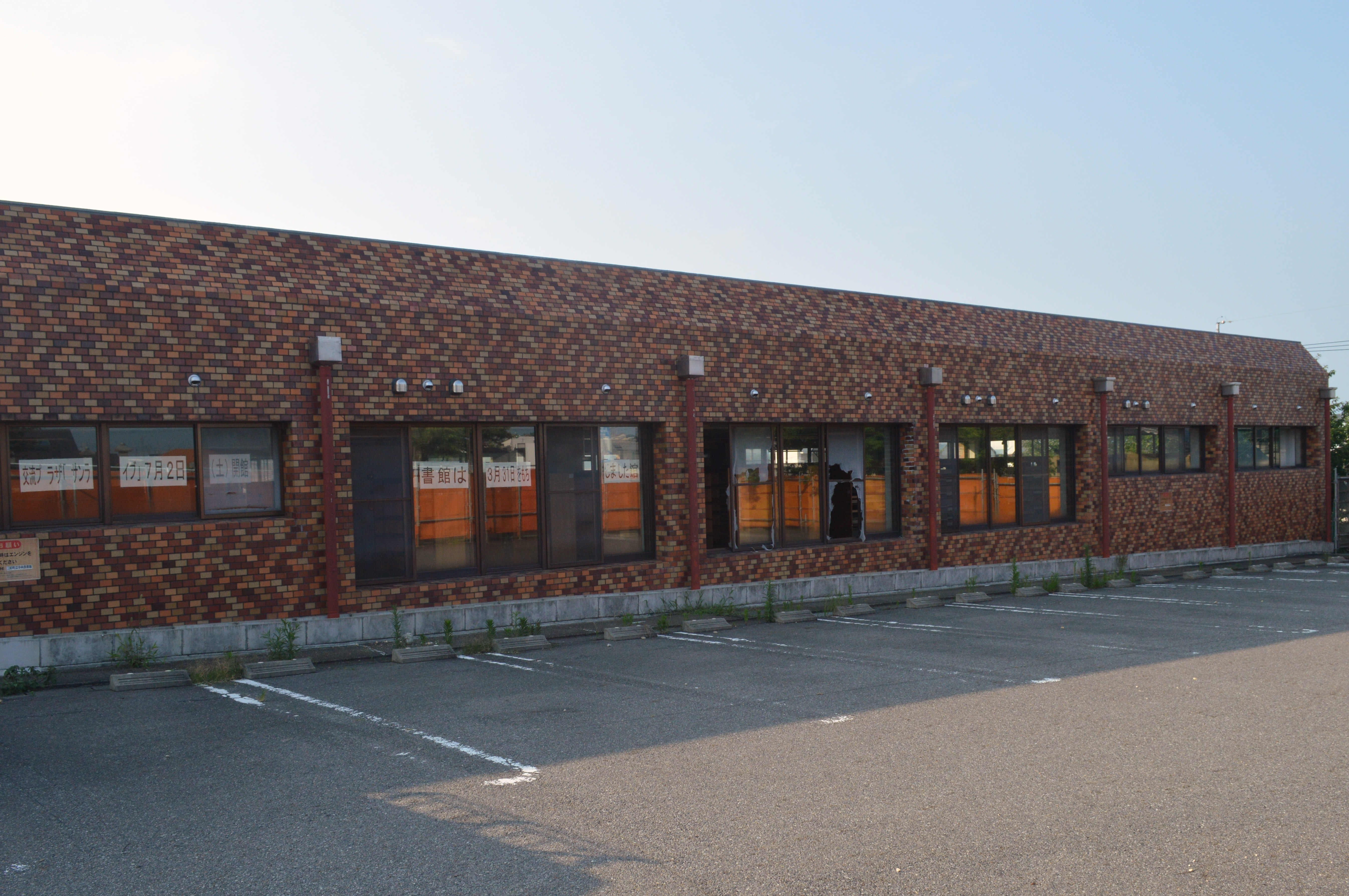 2016年3月30日をもって閉館したみよし市立中央図書館の旧館。同年7月撮影。2016年7月2日には約300m離れた場所に新館が開館している。